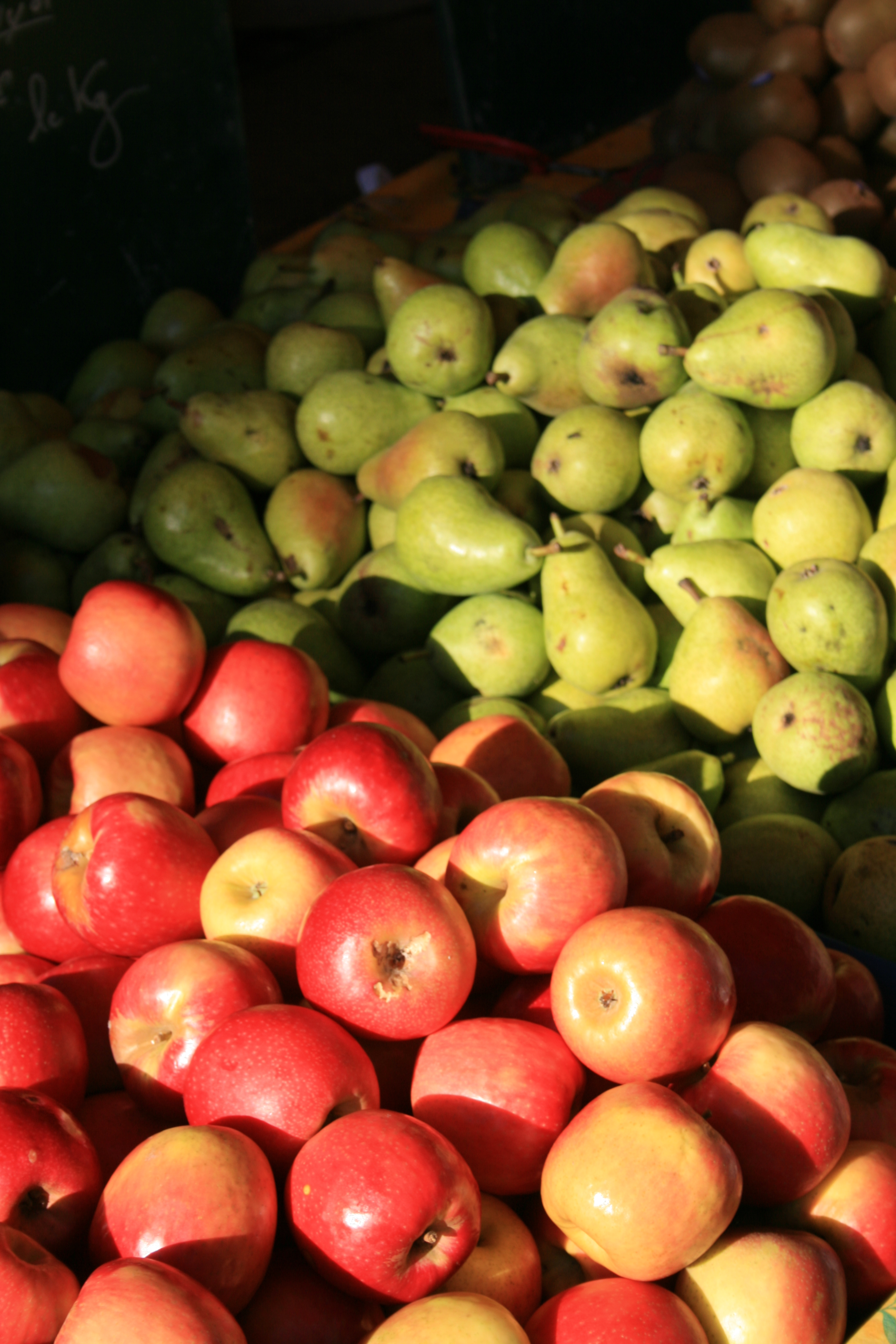 Pommes et poires au marché d'Orange